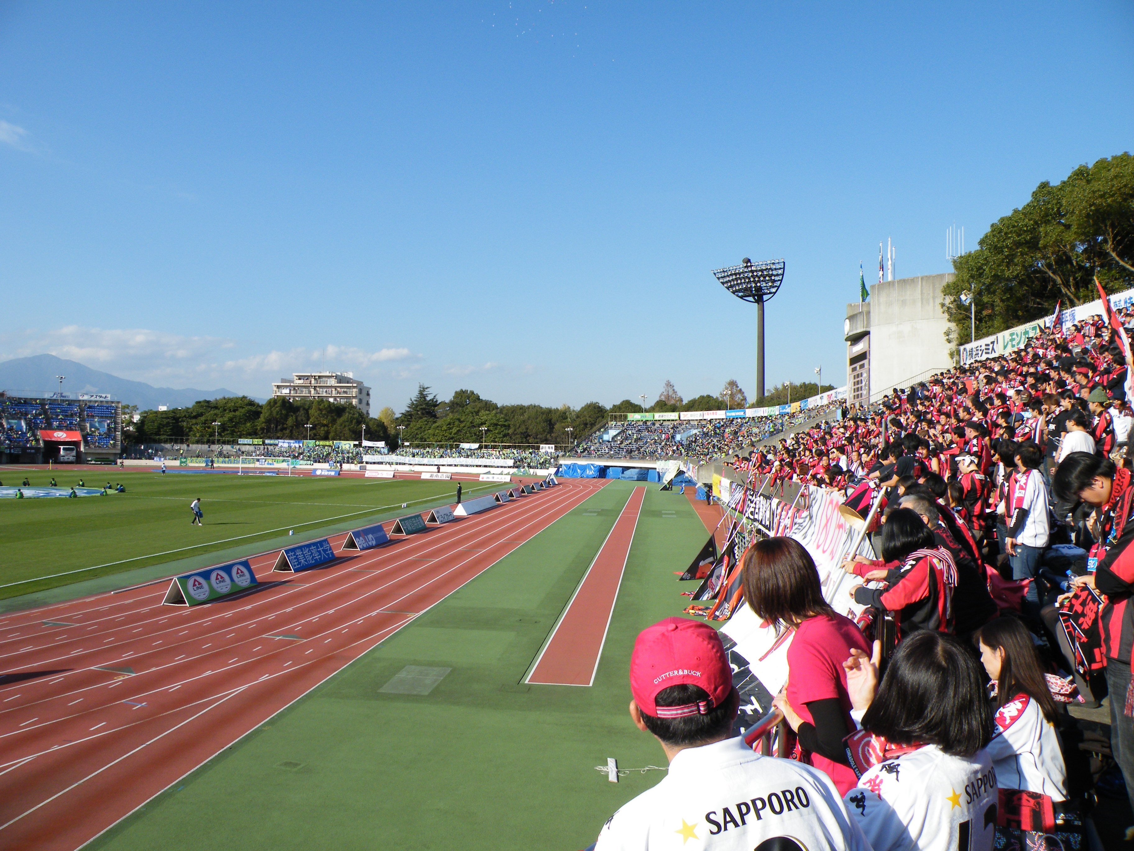 Jリーグディヴィジョン2第37節 湘南対札幌（平塚競技場）